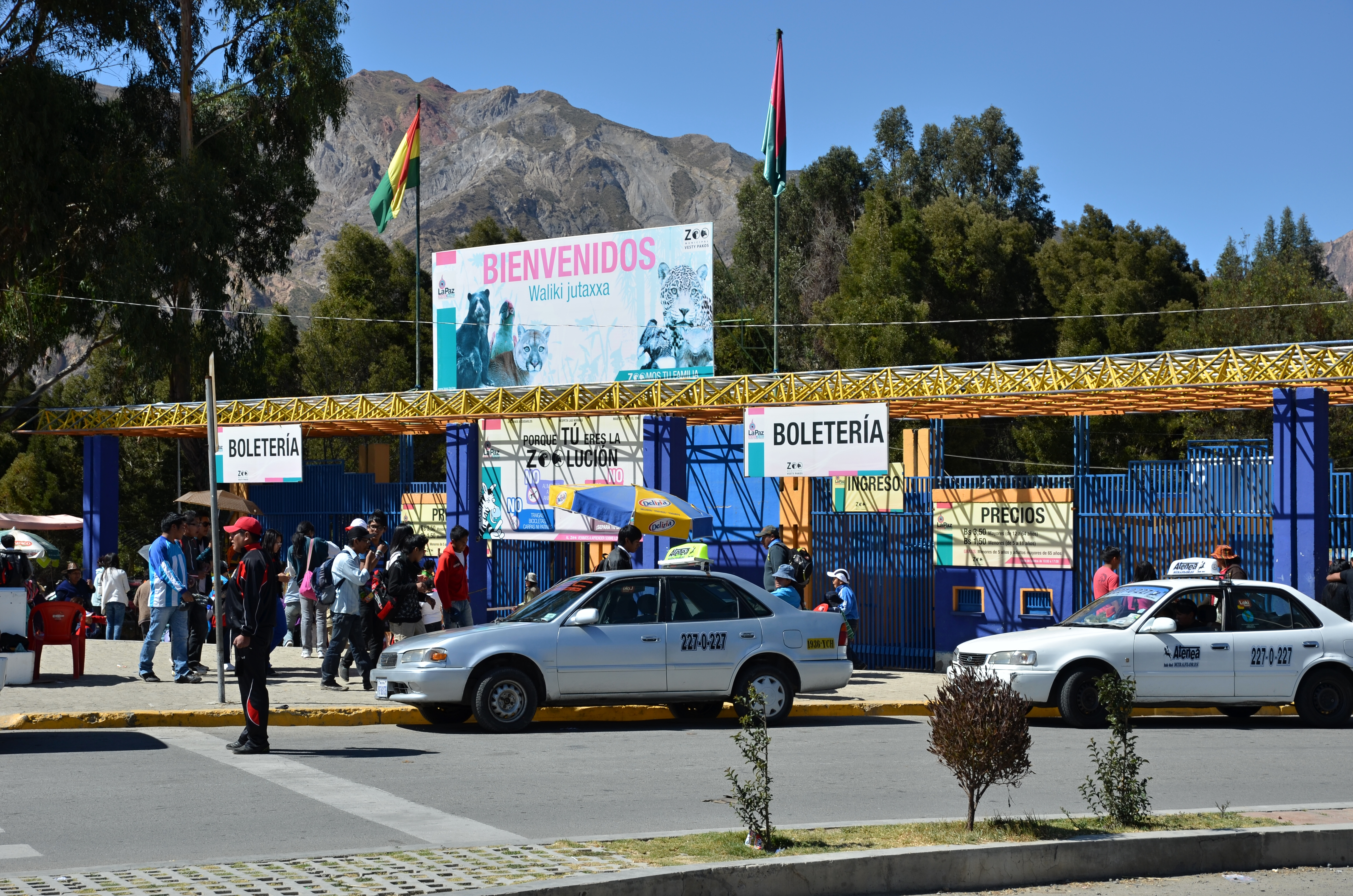 Mallasa - ZOO